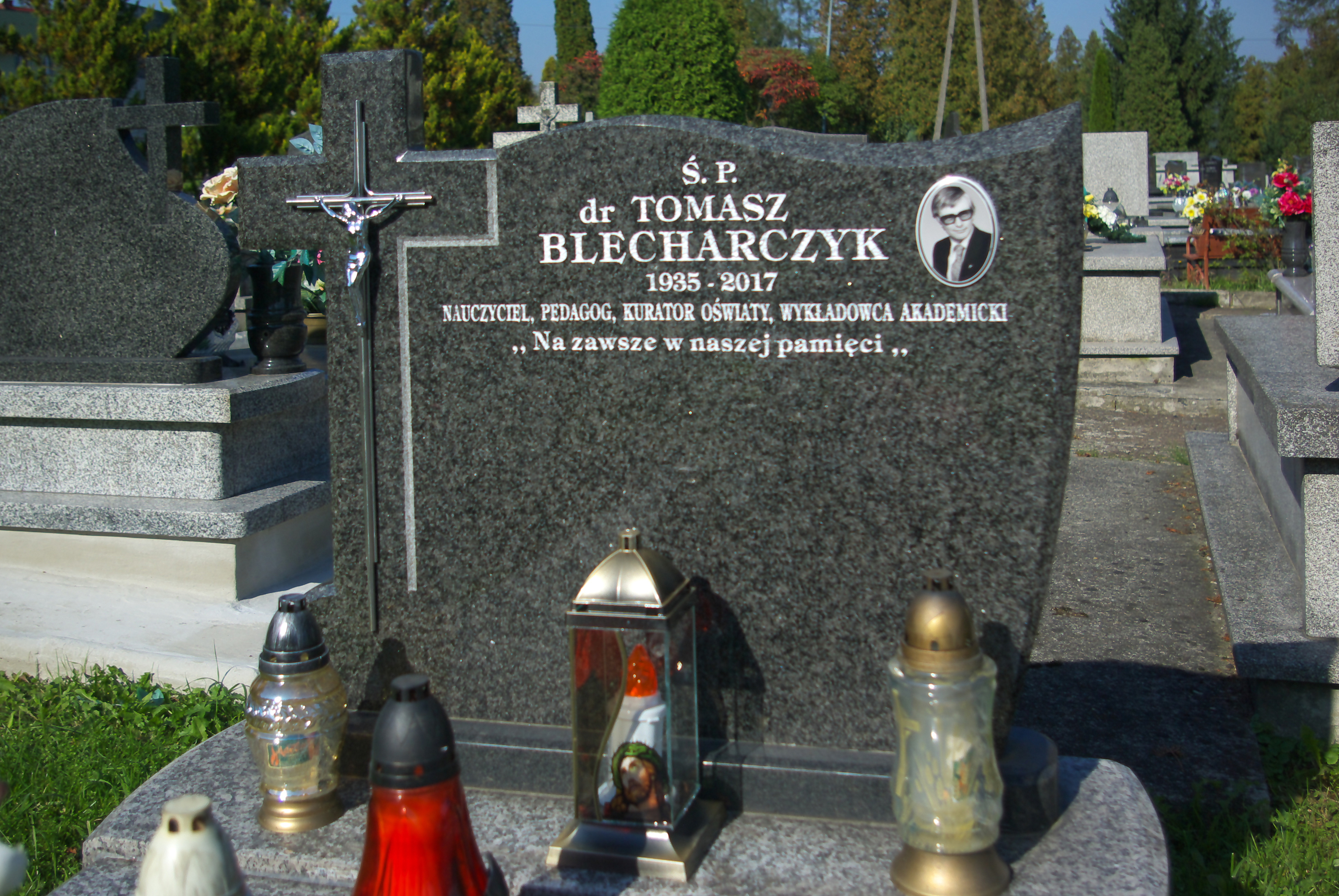 Nagrobek Tomasza Blecharczyka na Cmentarzu Centralnym w Sanoku.